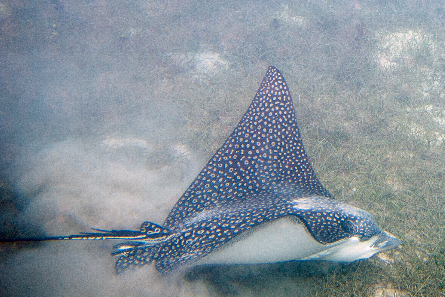 Swimming at Wakaya Island in Fiji